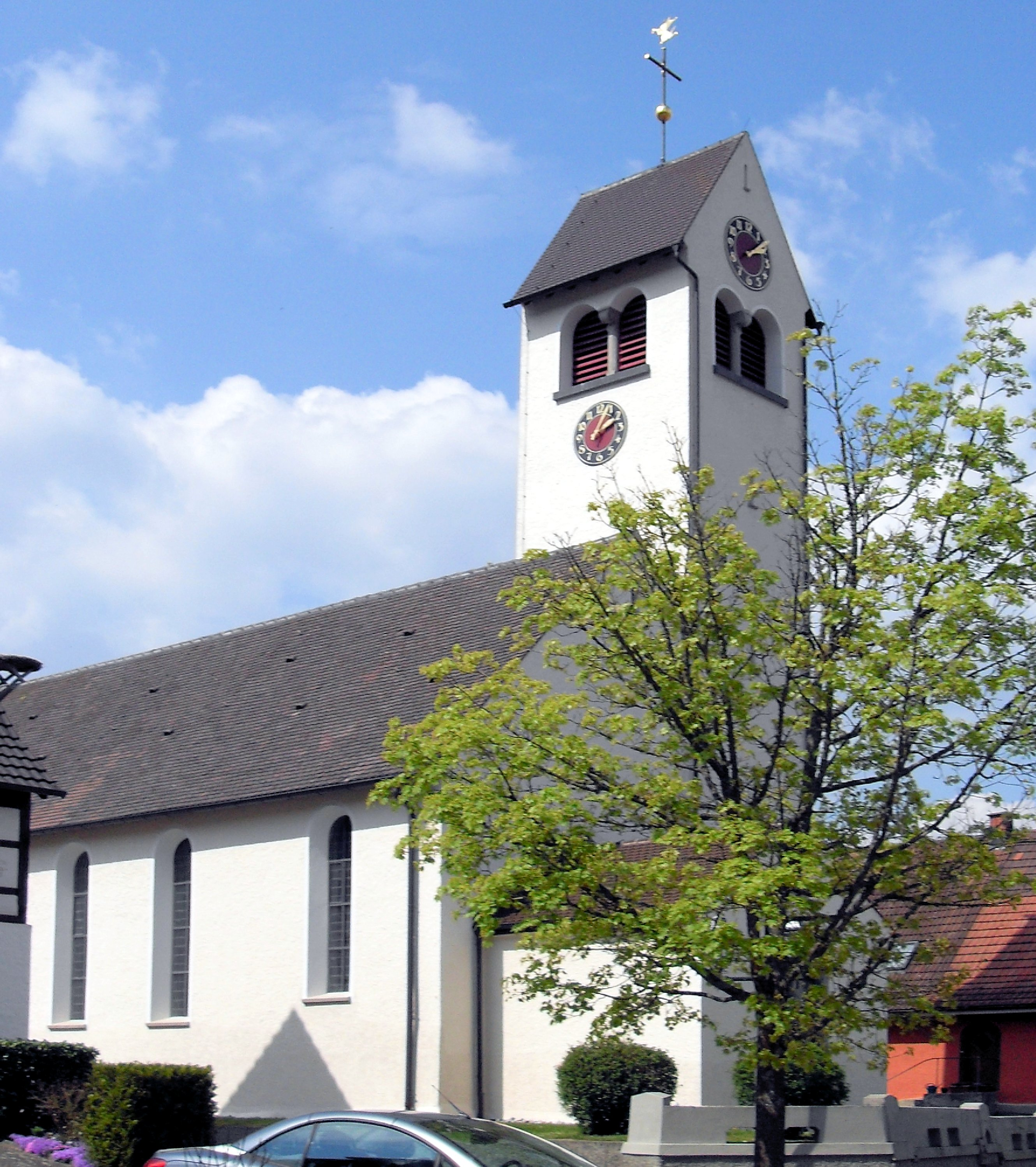 katholische Kirche St. Blasus in Bankholzen, Gemeinde Moos, Deutschland